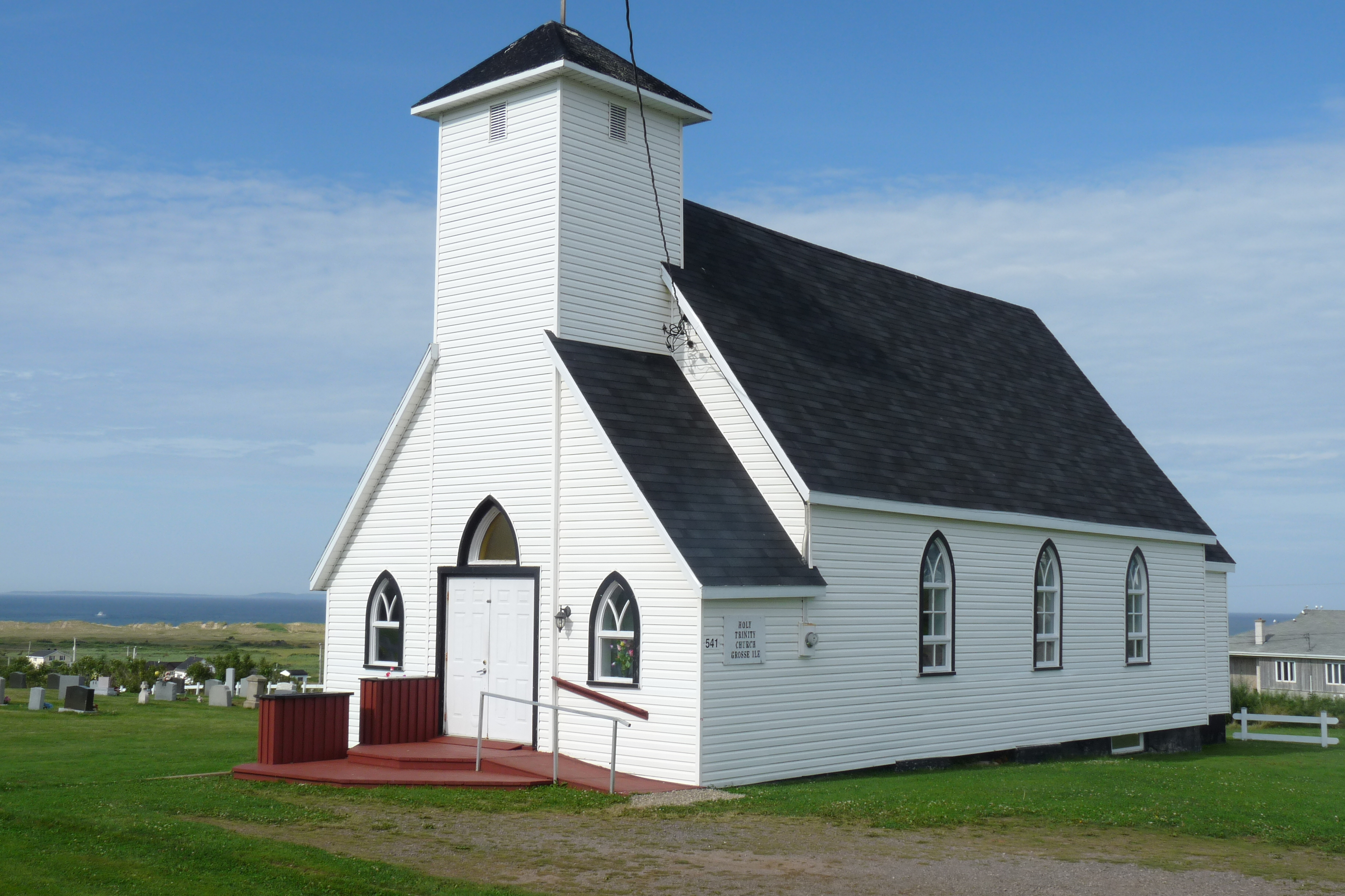 Église de la Grosse île aux Iles de la Madeleine